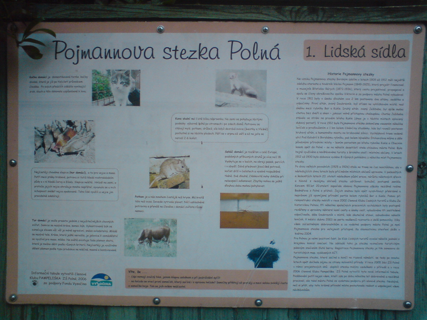 Polná - informační tabule u prvního zastavení na Pojmanově naučné stezce.